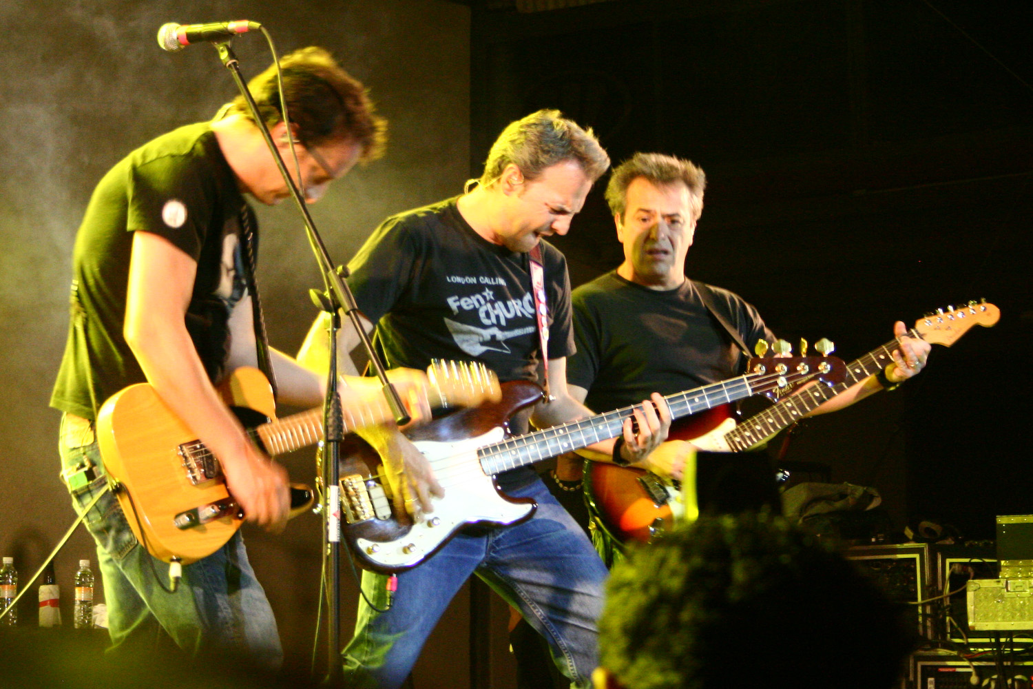 Hombres G es una de las bandas españolas de rock/pop con mayor trascendencia desde su aparición a principios de los años ochenta hasta la actualidad, dadas sus cifras de ventas y la dimensión de su éxito, que abarca tanto España como América además de algunos puntos en Portugal.